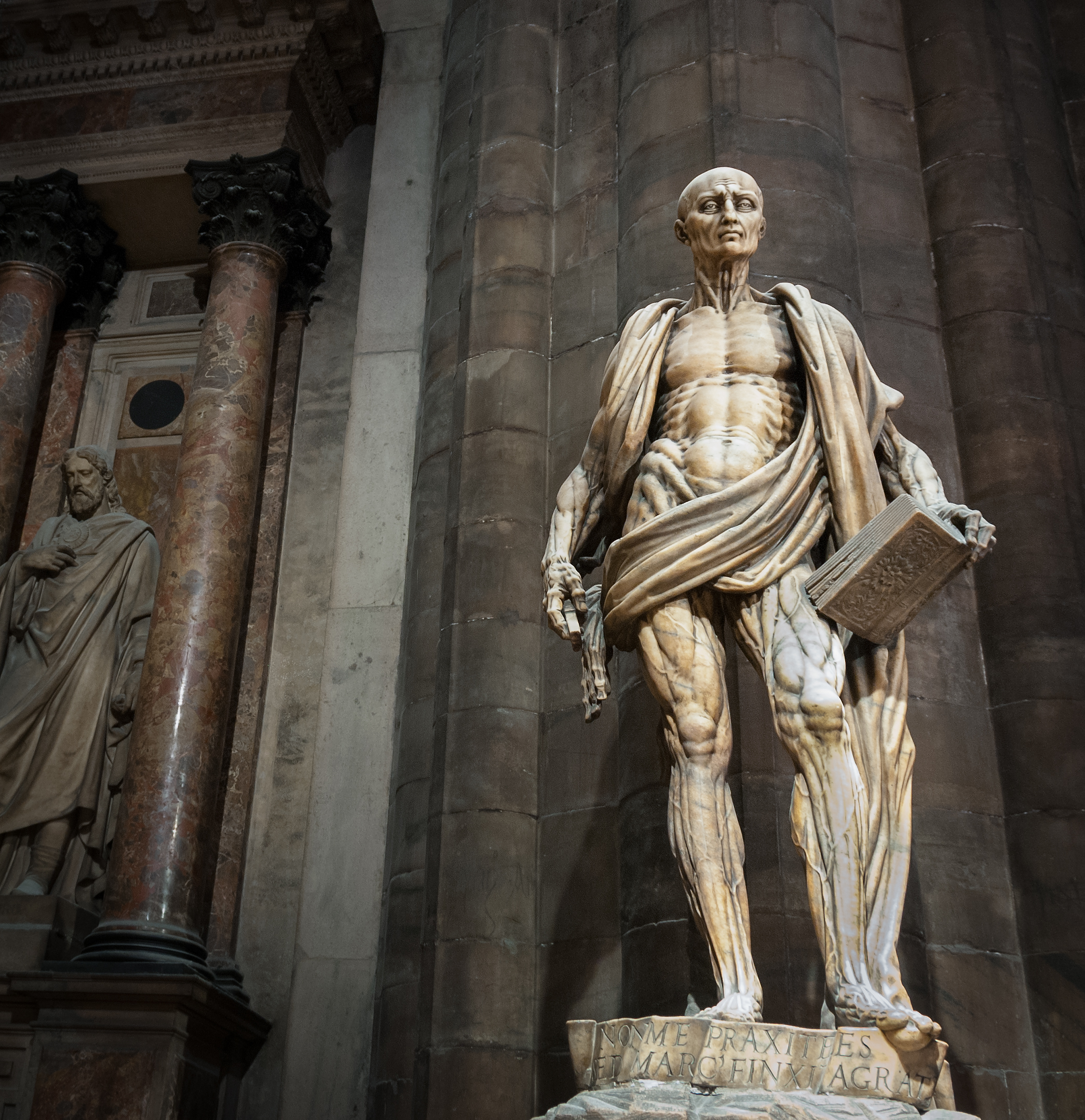 Duomo di Milano